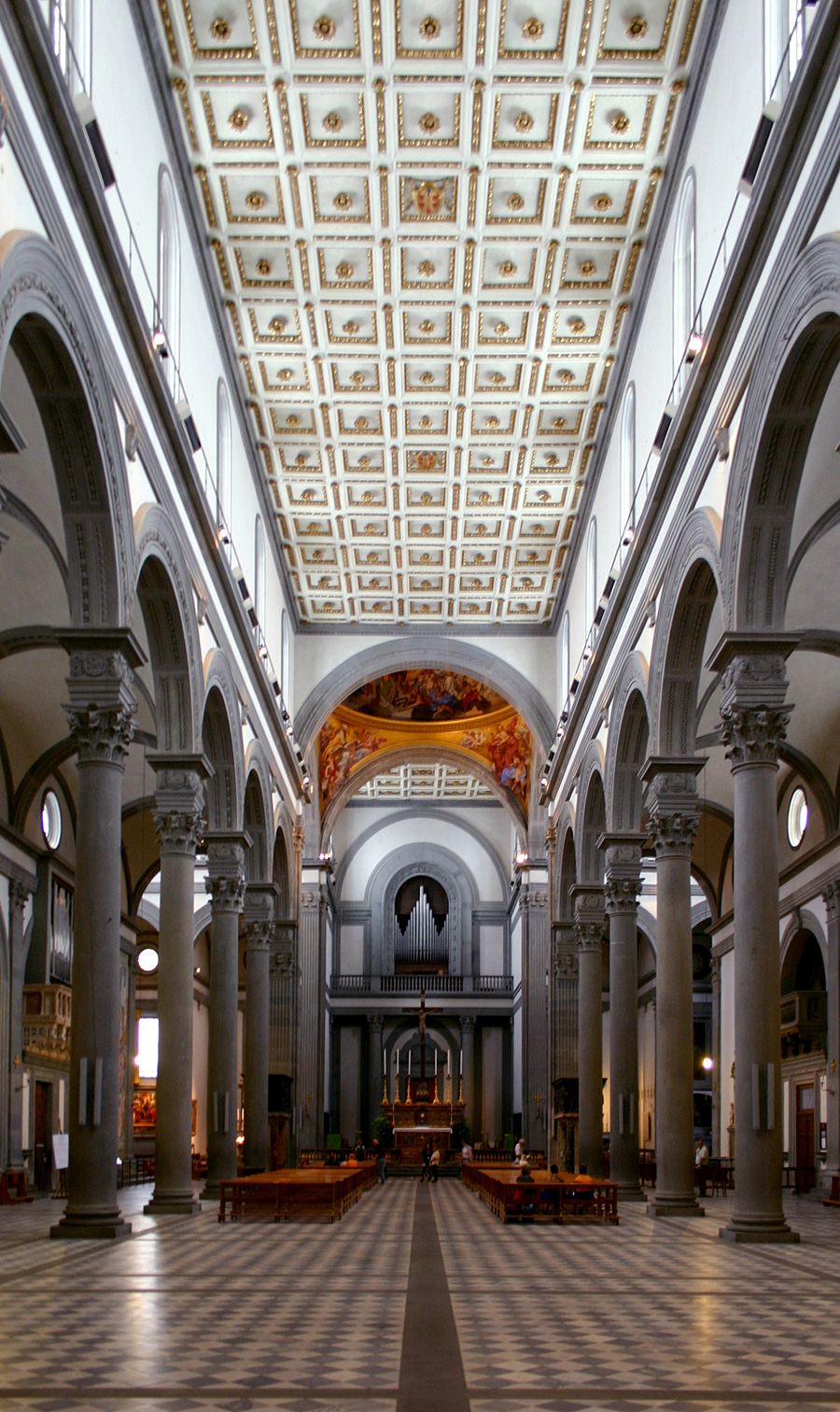 Einblick ins Langhaus (Richtung Chor) der Basilica di San Lorenzo di Firenz